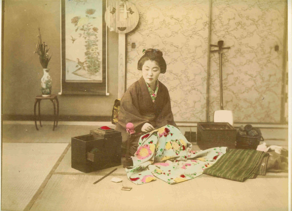 Fotograf: Ogawa Kazumasa. Ohne Titel: Näherin. Einbelichtete Nummer: 1050. Handkoloriertes Albumin-Foto ca. 1880. Foto: 21,3 x 28,5 cm quer (aufgezogen auf Karton: 33 x 48,5 cm quer)